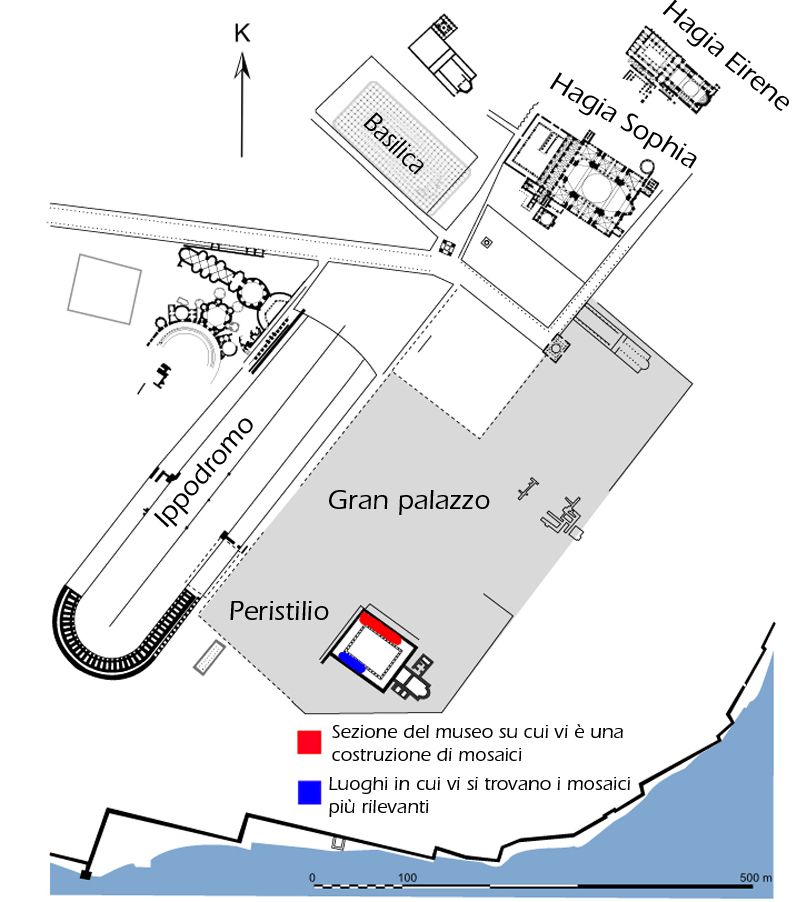 Piantina del noto Museo del Mosaico di Istanbul